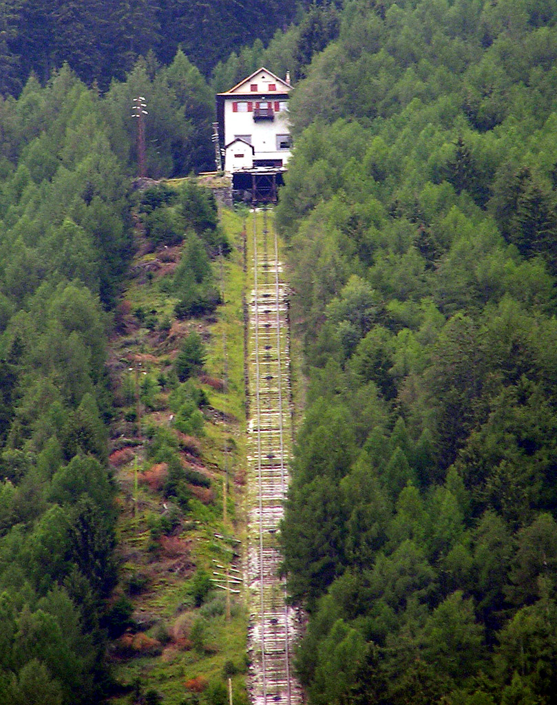 Die Bergstation des Schrägaufzuges der Laaser Marmorbahn